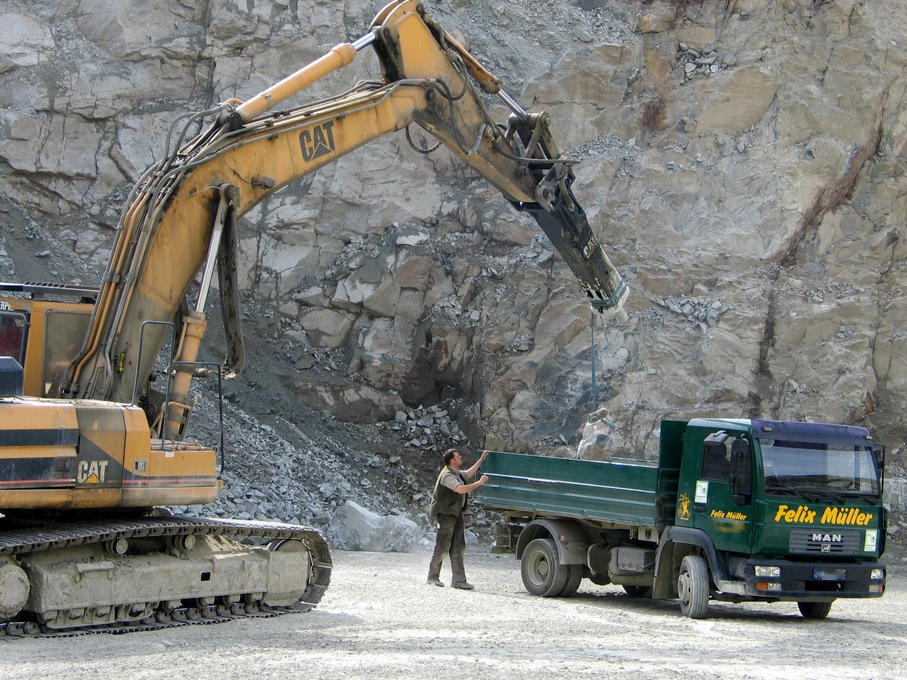 Bagger von CAT mit Spezialvorrichtung im Einsatz auf einem Steinbruch